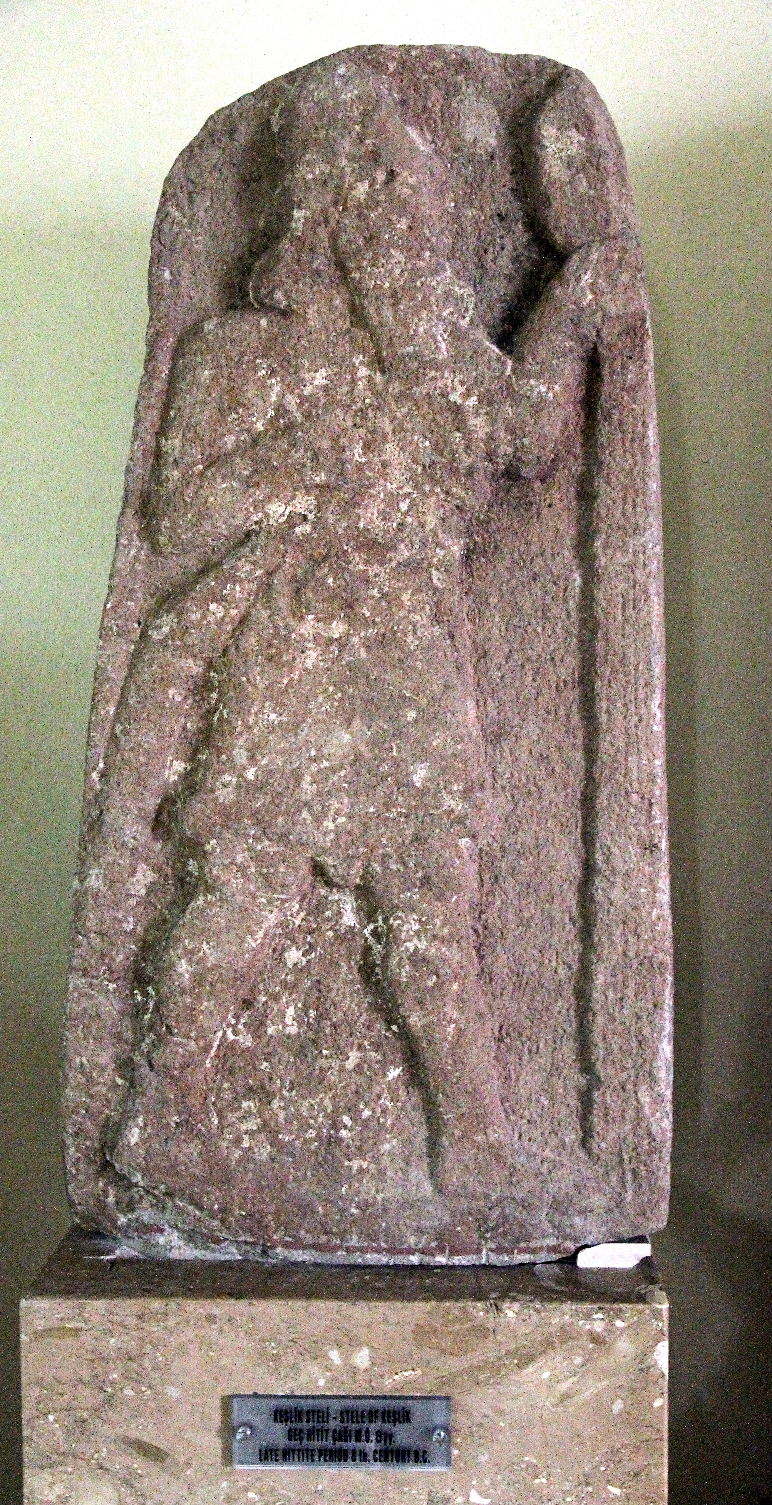 Archäologisches Museum Niğde, Türkei, hethitische Stele von Keşlik